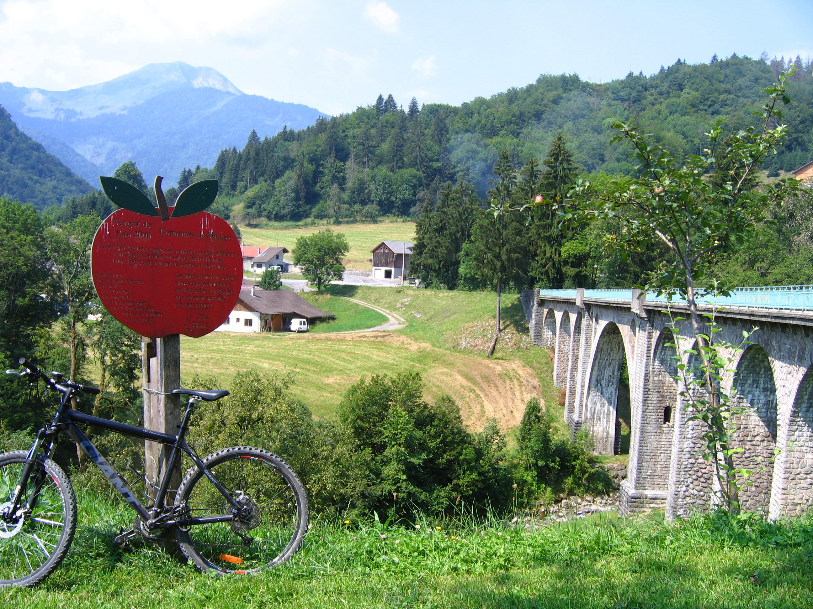 Mieussy (Hte savoie 74)